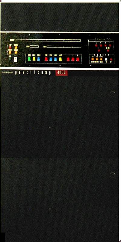 A Practicomp 4000 kisszámítógép előlapja